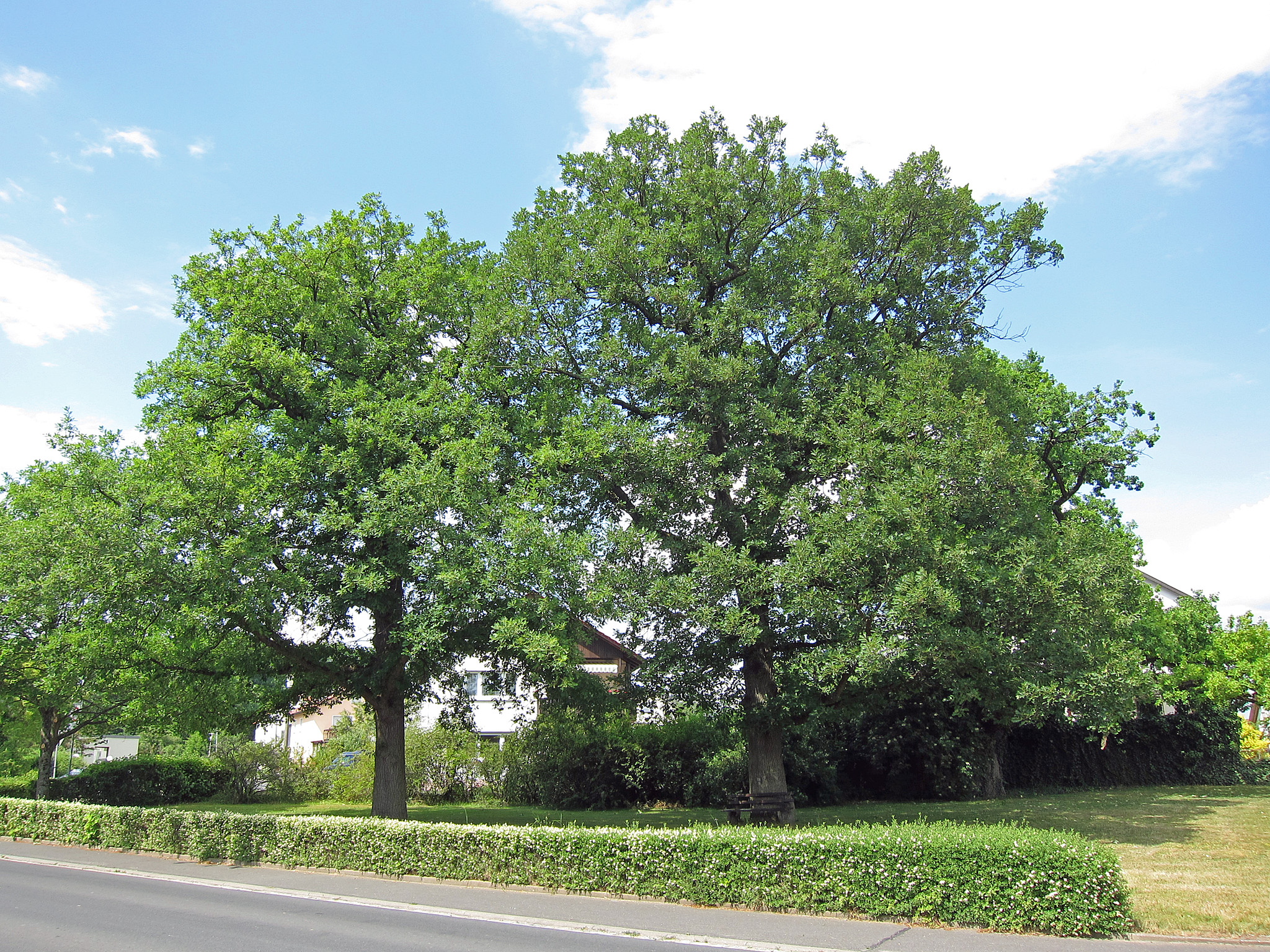 Drei Eichen im Gereuth bei Ebenhausen